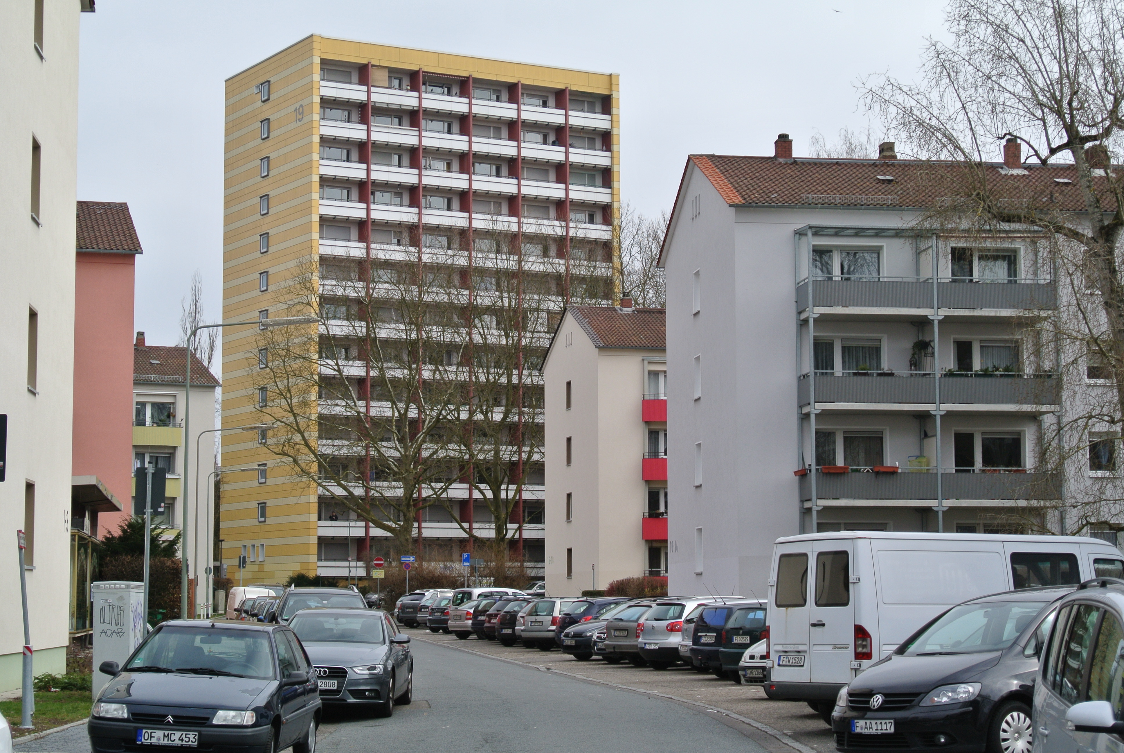 Wohnhochhaus; Blick nach Osten